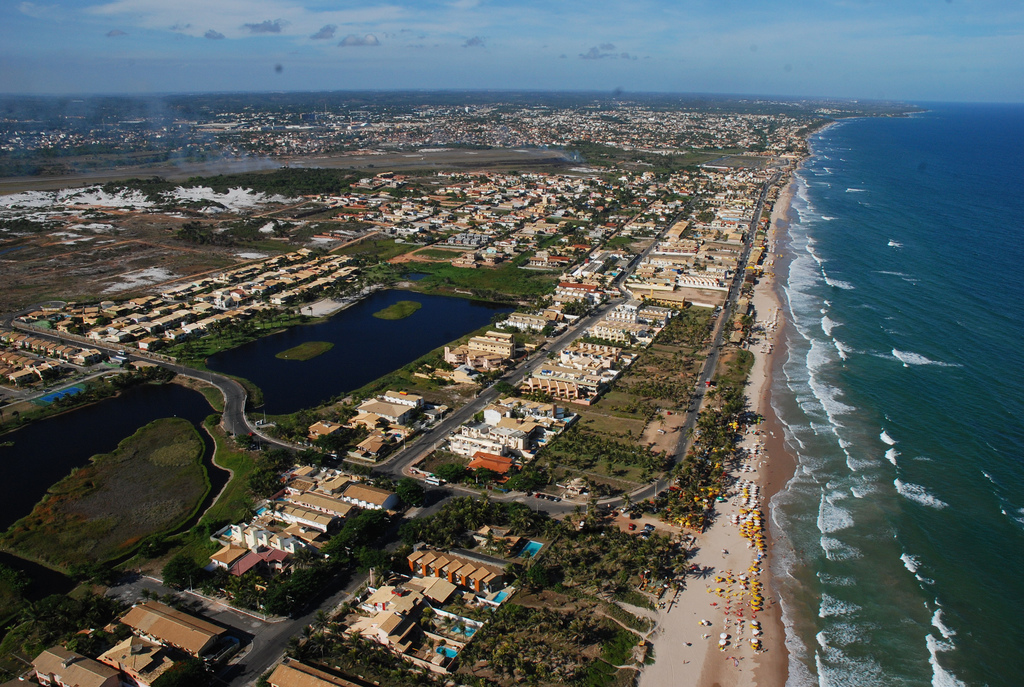 Vista aérea de Stella Maris, bairro de Salvador, e de Lauro de Freitas ao fundo, depois do Aeroporto.